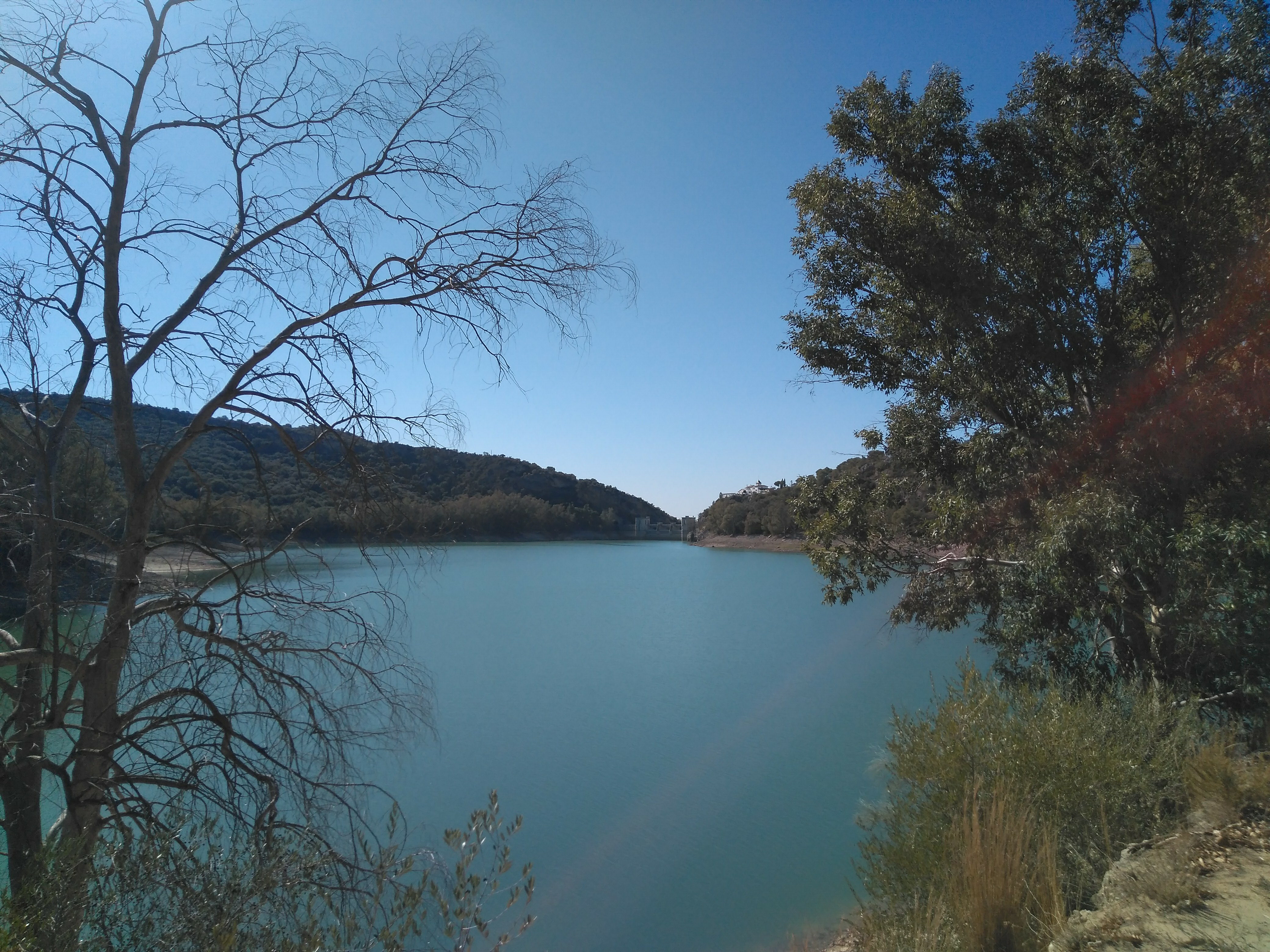 Pantano de Bornos, parte final junto a la presa. Se observa la casa del ingeniero. Borno (Andalucía, España)